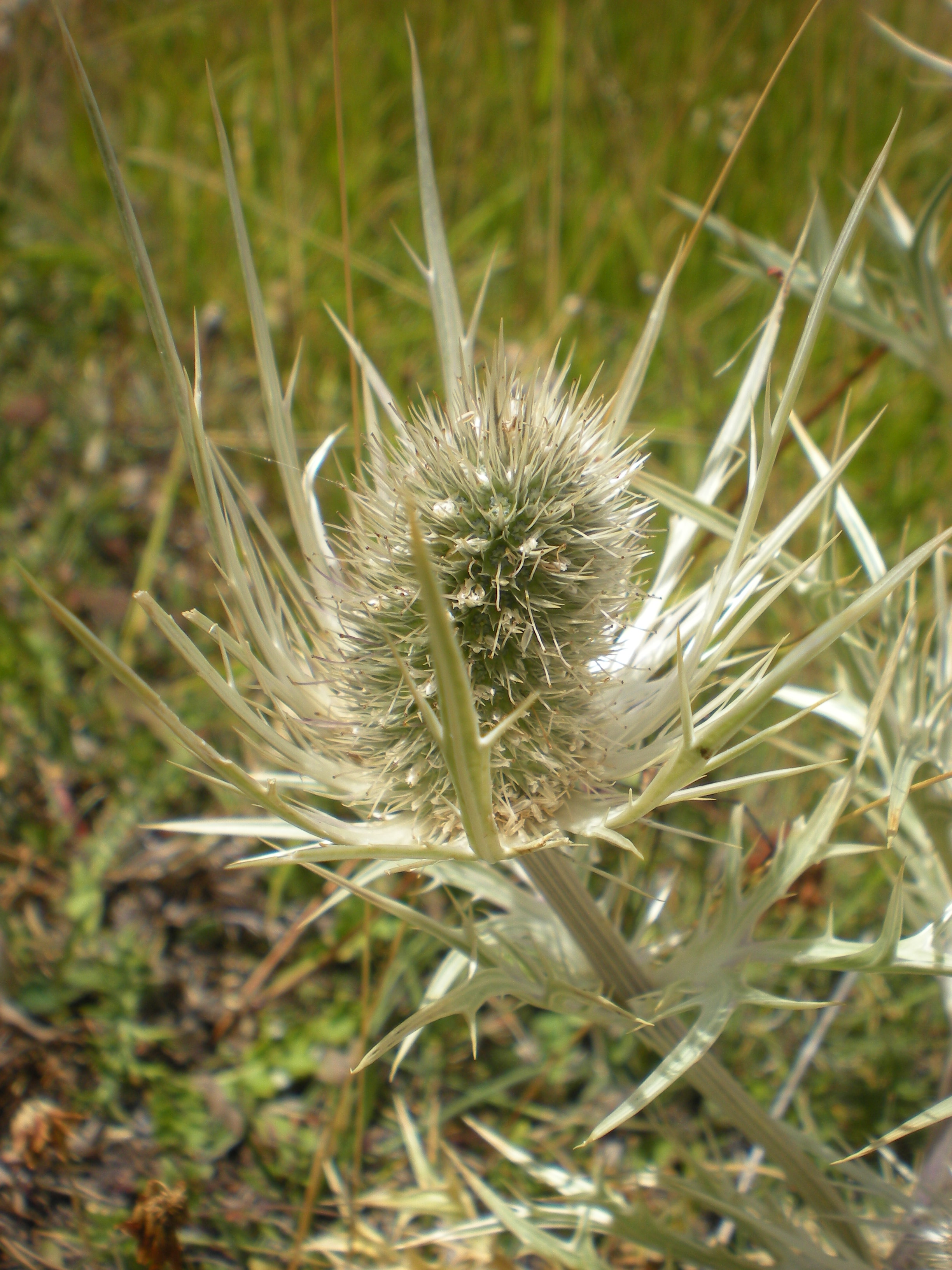 Capitule 2